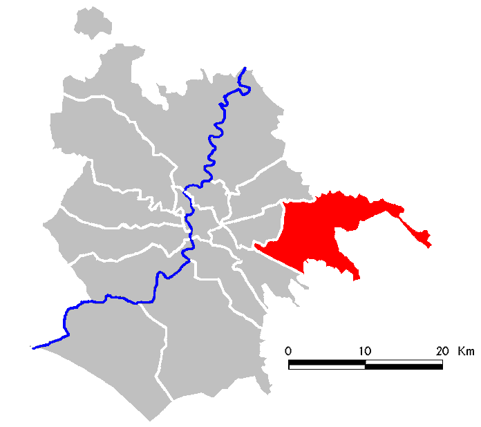 Municipio Roma VI